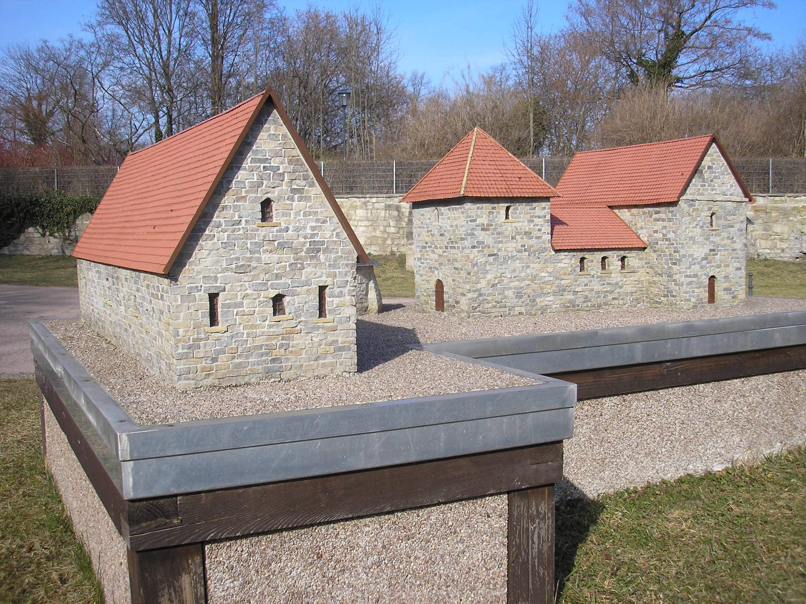 Das Modell des Walpurgisklosters in der Schlossruine in Arnstadt (Thüringen).